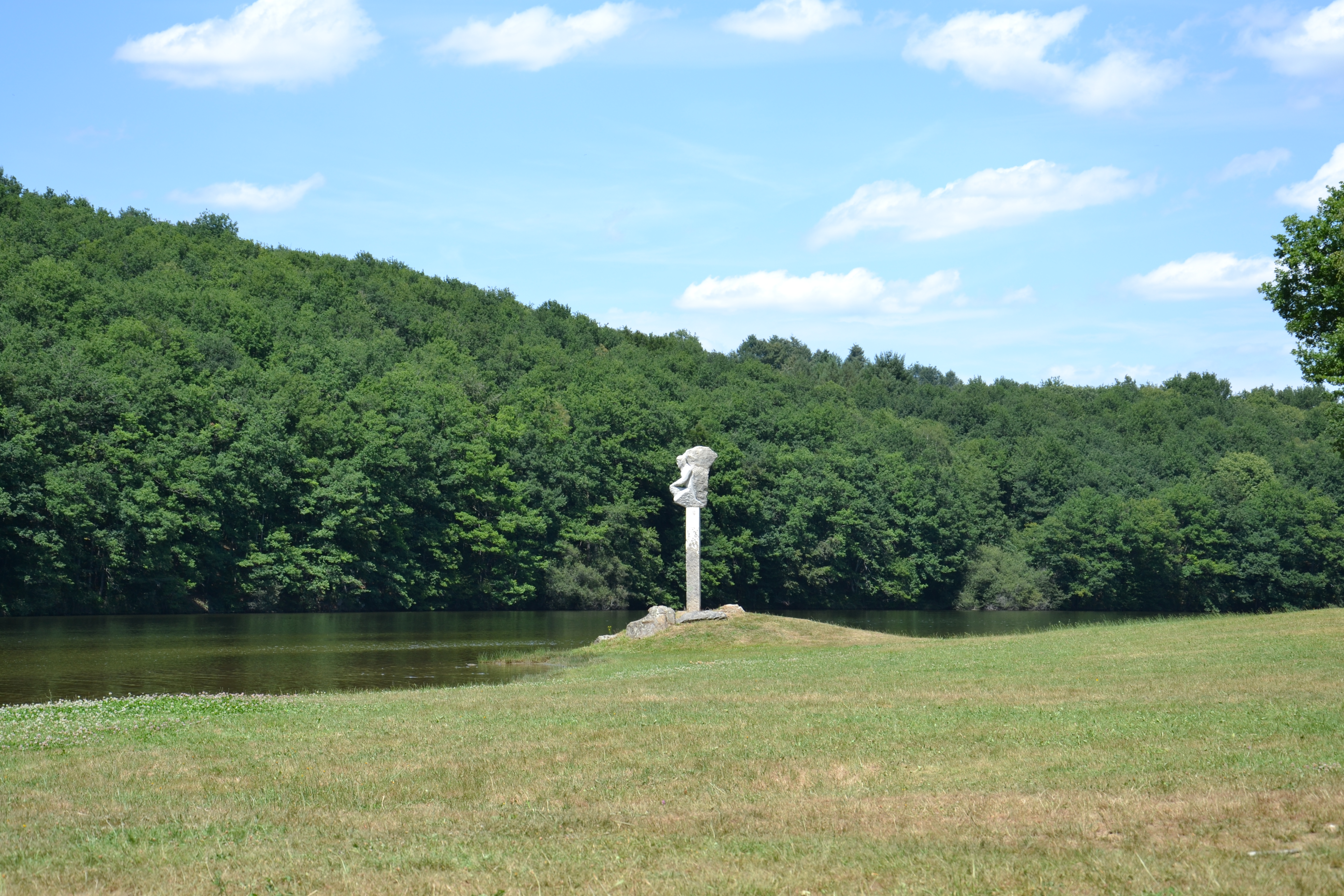 Vue partielle du lac de Sainte-Hélène et d'une sculpture contemporaine à Bujaleuf (Haute-Vienne, France)